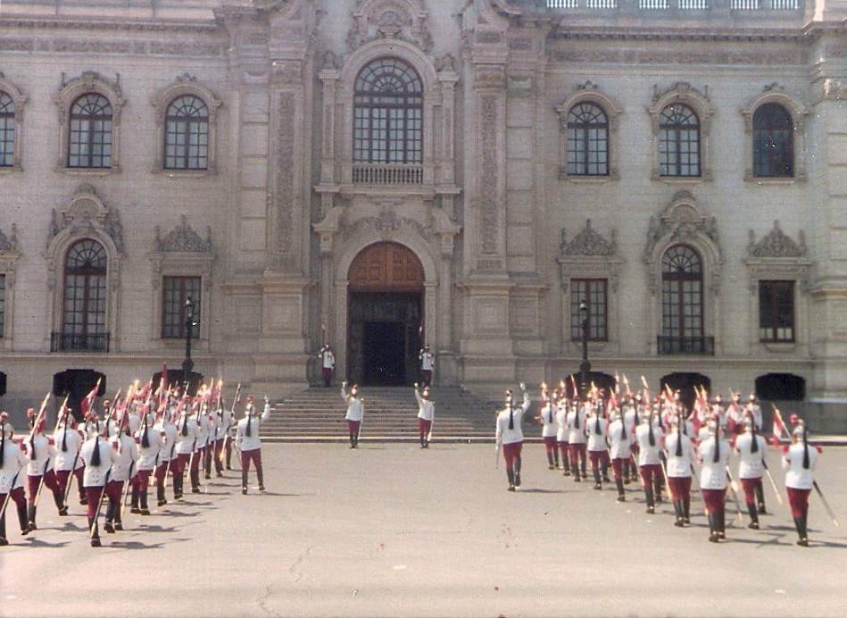 Relevo de la Guardia de Honor en el Palacio de Gobierno en Lima Perú, a cargo del regimiento de Caballeria "Mariscal Domingo Nieto" Escolta del Presidente de la Republica.